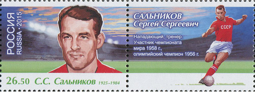 Чемпионат мира по футболу FIFA 2018 в России. Легенды футбола.С.С. Сальников (1925-1984)